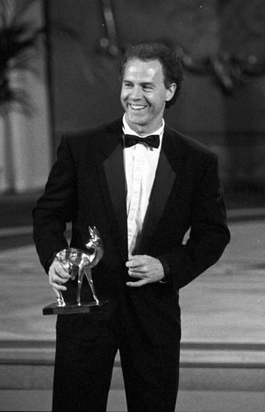 Leipzig, Bambi-Verleihung, Franz Beckenbauer BER-23/27.11.90/Leipzig: Bambi-Preisverleihung / Vor zahlreich vertretener Prominenz aus Politik, Kultur und Medien sowie aus Wirtschaft, Sport, Showbusiness und Gesellschaft fand im Opernhaus am Augustus-Platz die Surda-Medienpreisverleihung statt. Fußballstar Franz Beckenbauer wurde mit dem Sport-Bambi-Preis für seine Intuition und Perfektion geehrt, mit der er als Teamchef die deutsche Nationalmannschaft 1990 zum WM-Titel geführt hatte. Abgebildete Personen: Beckenbauer, Franz: Fußballnationalspieler, Bundesrepublik Deutschland (GND 118508067)